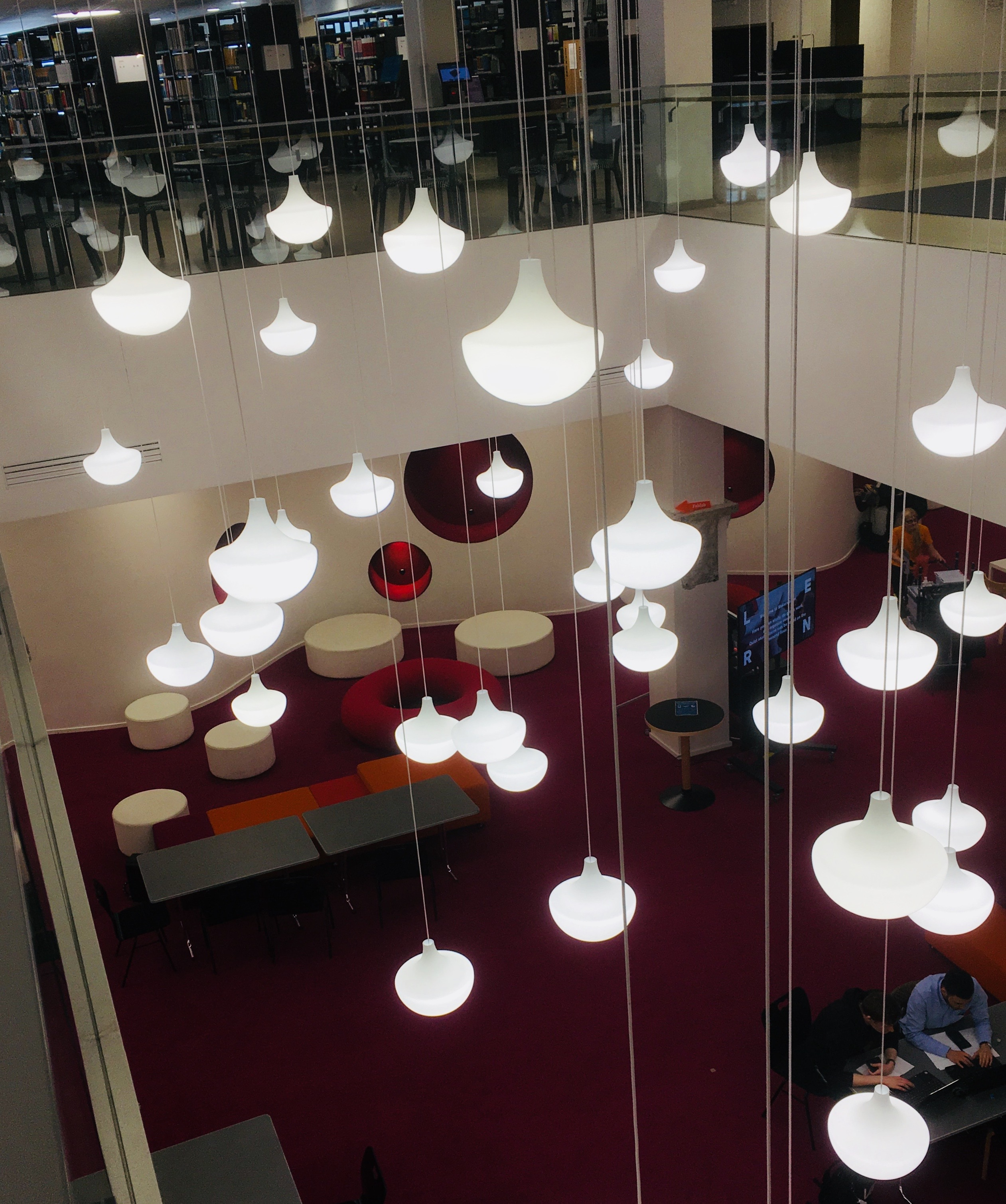 Lisa Johansson-Papen suunnittelema Belle-valaisin Aalto-yliopiston Harald Herlin -oppimiskeskuksessa.